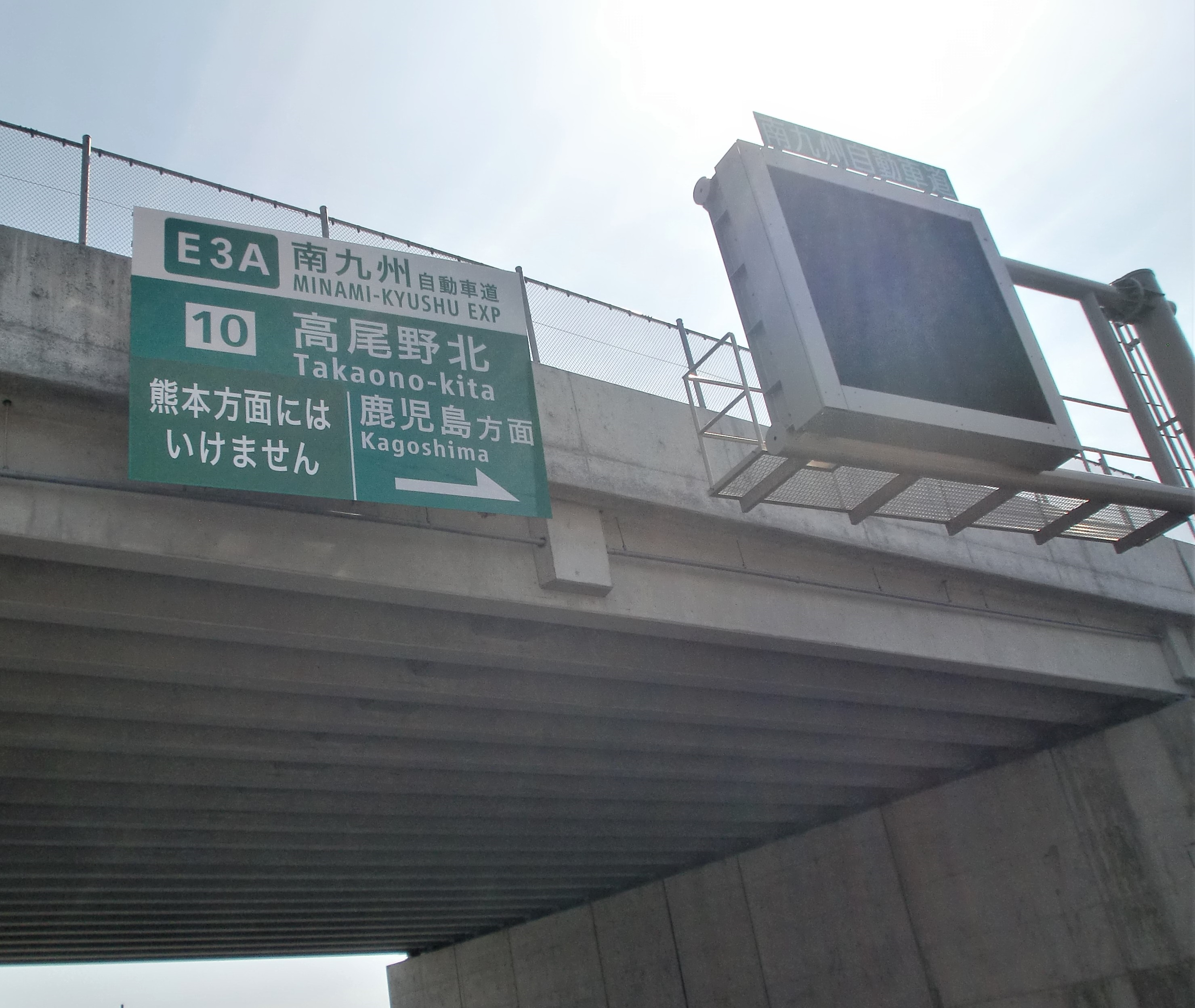 高尾野北インターチェンジの標識。九州で初めて高速道路ナンバリングが書かれた標識である。